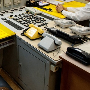 Телефоны прямой связи на блочном щите управления Белоярской АЭС